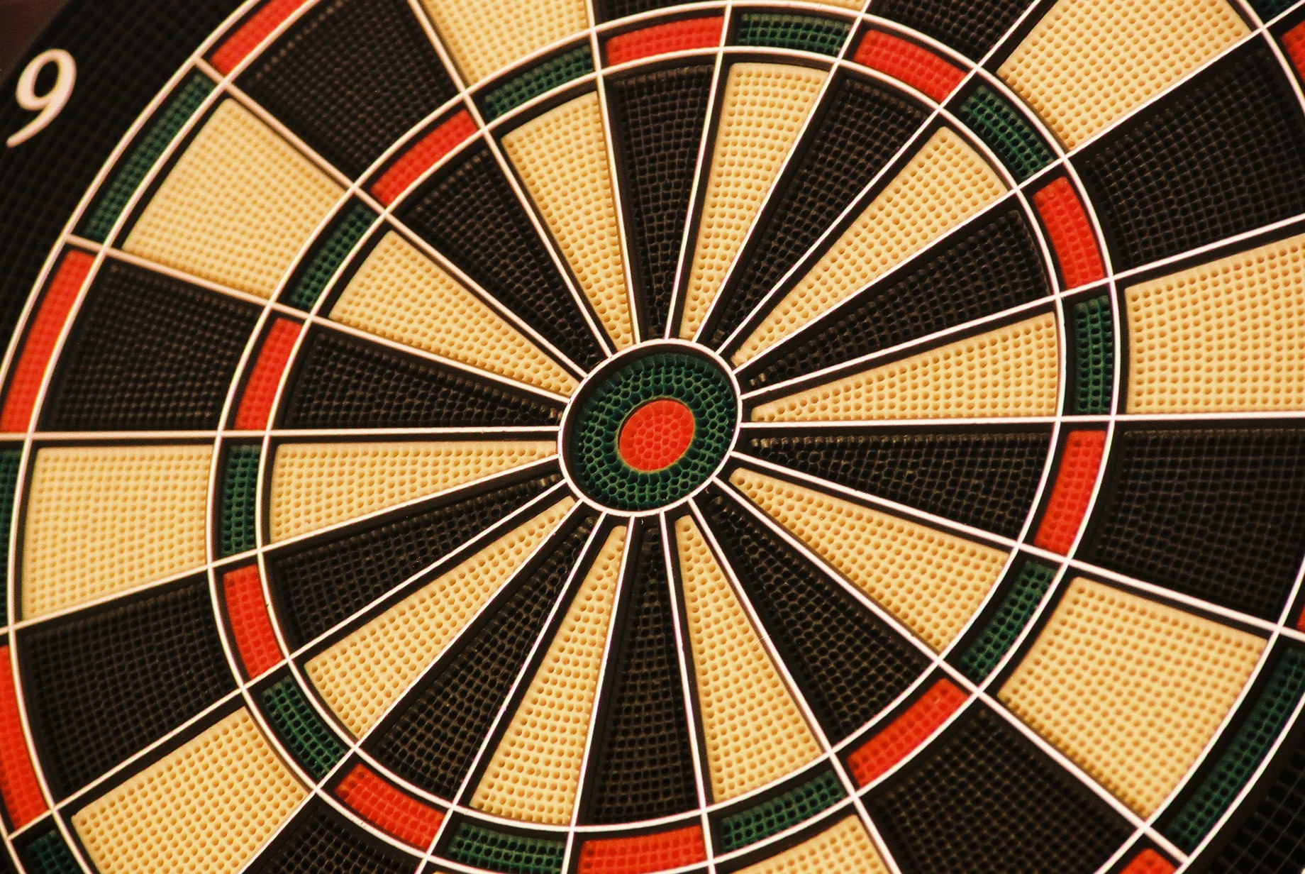 Detailaufnahme einer elktronischen Softdartscheibe